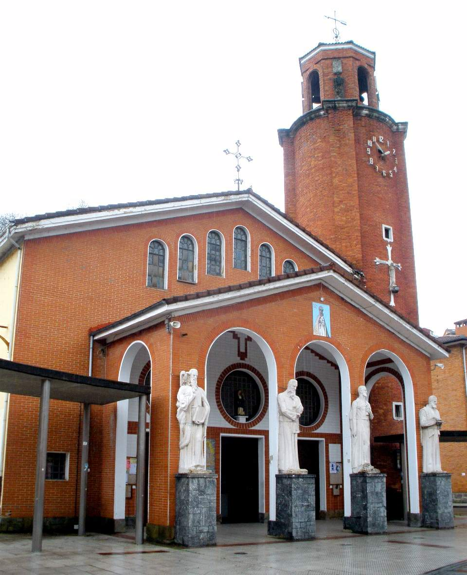 Blimea (San Martín del Rey Aurelio, Asturias) - Iglesia de Santa María de las Nieves